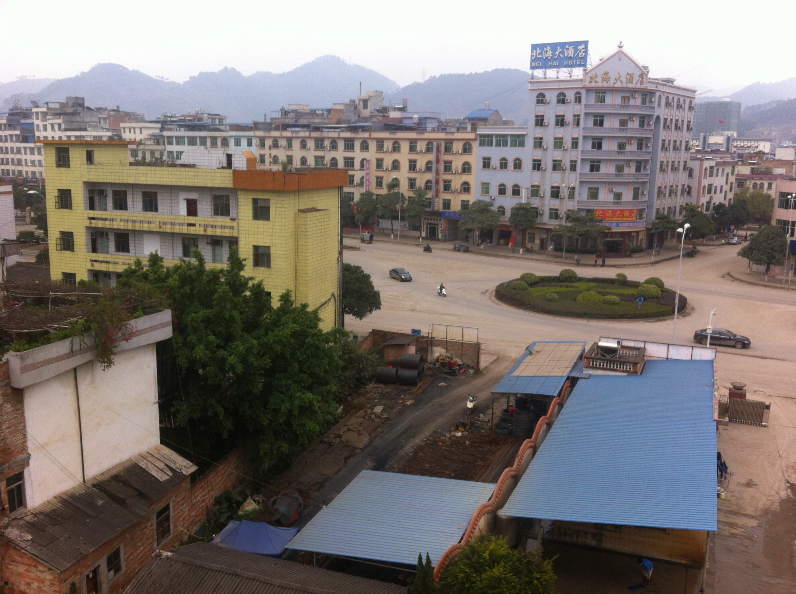 粵語: 雲南富寧